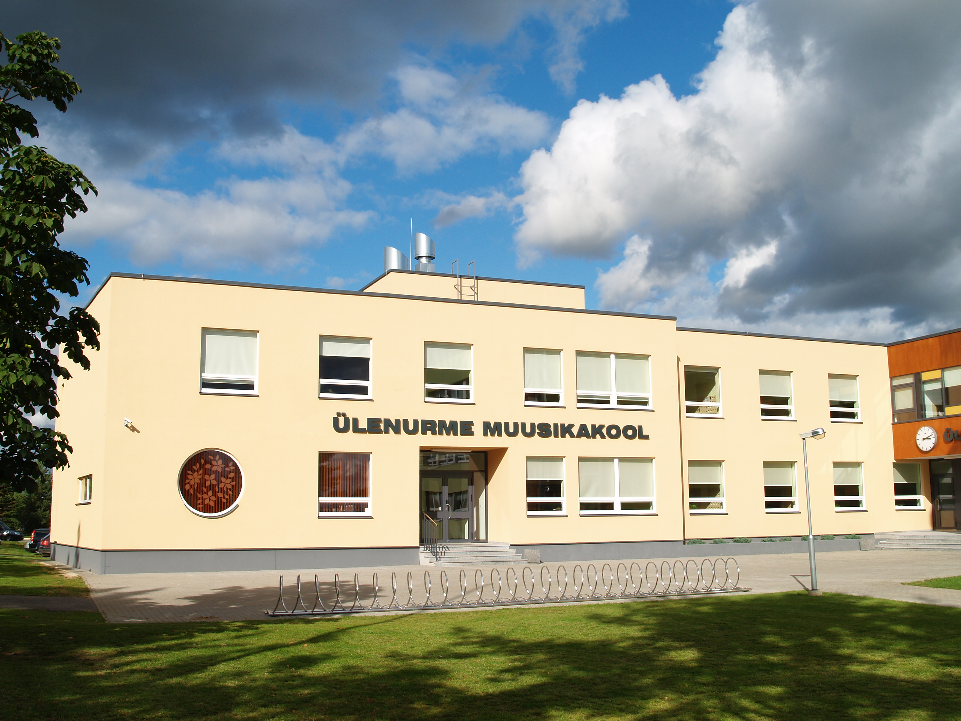 Ülenurme Muusikakool